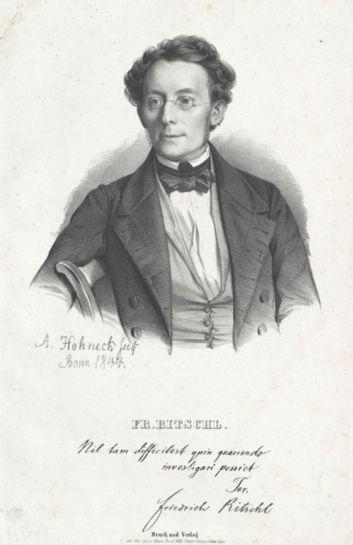 Friedrich Wilhelm Ritschl (1805–1876)